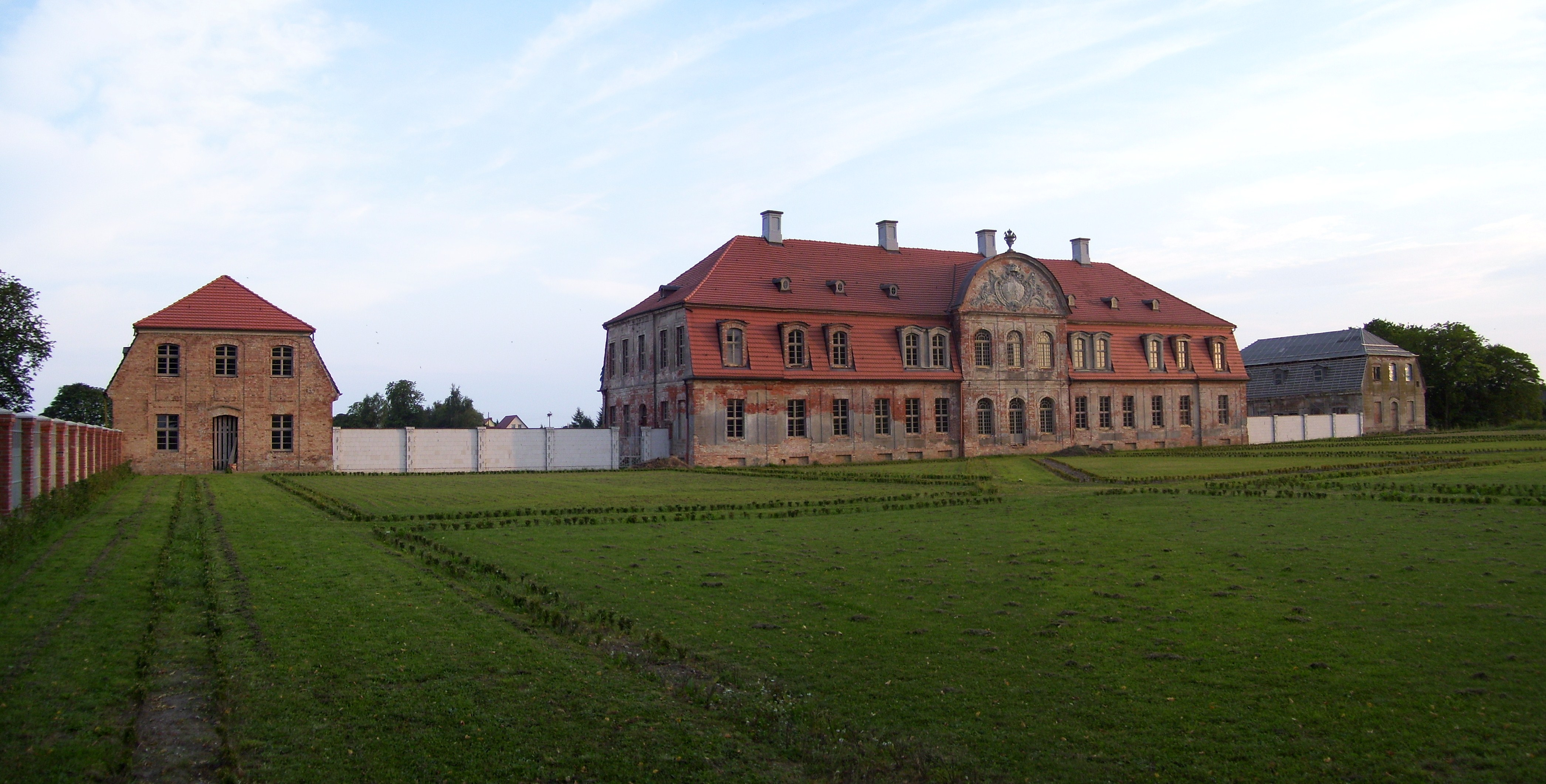 Gützkow, Gemeinde Röckwitz, Landkreis Demmin, Herrenhaus Parkseite